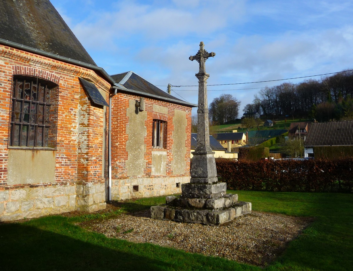 Croix de cimetière de Saint-Germain-des-Essourts